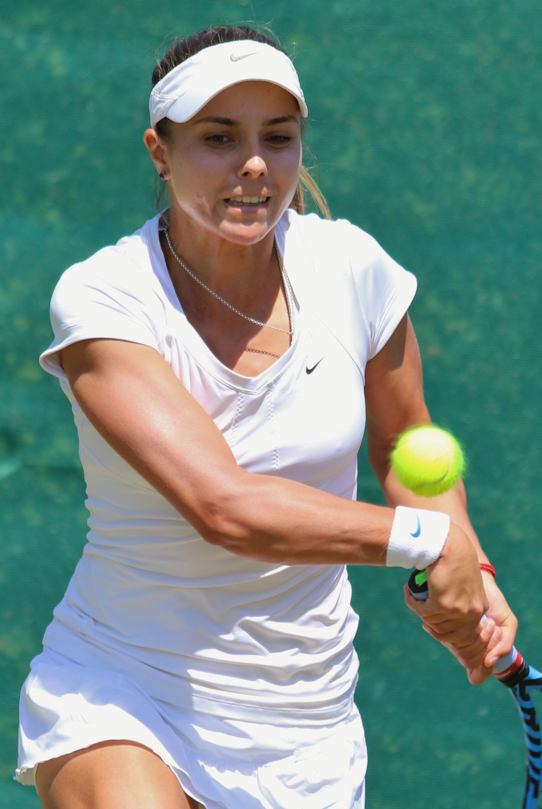 Tomova WMQ18 (27)